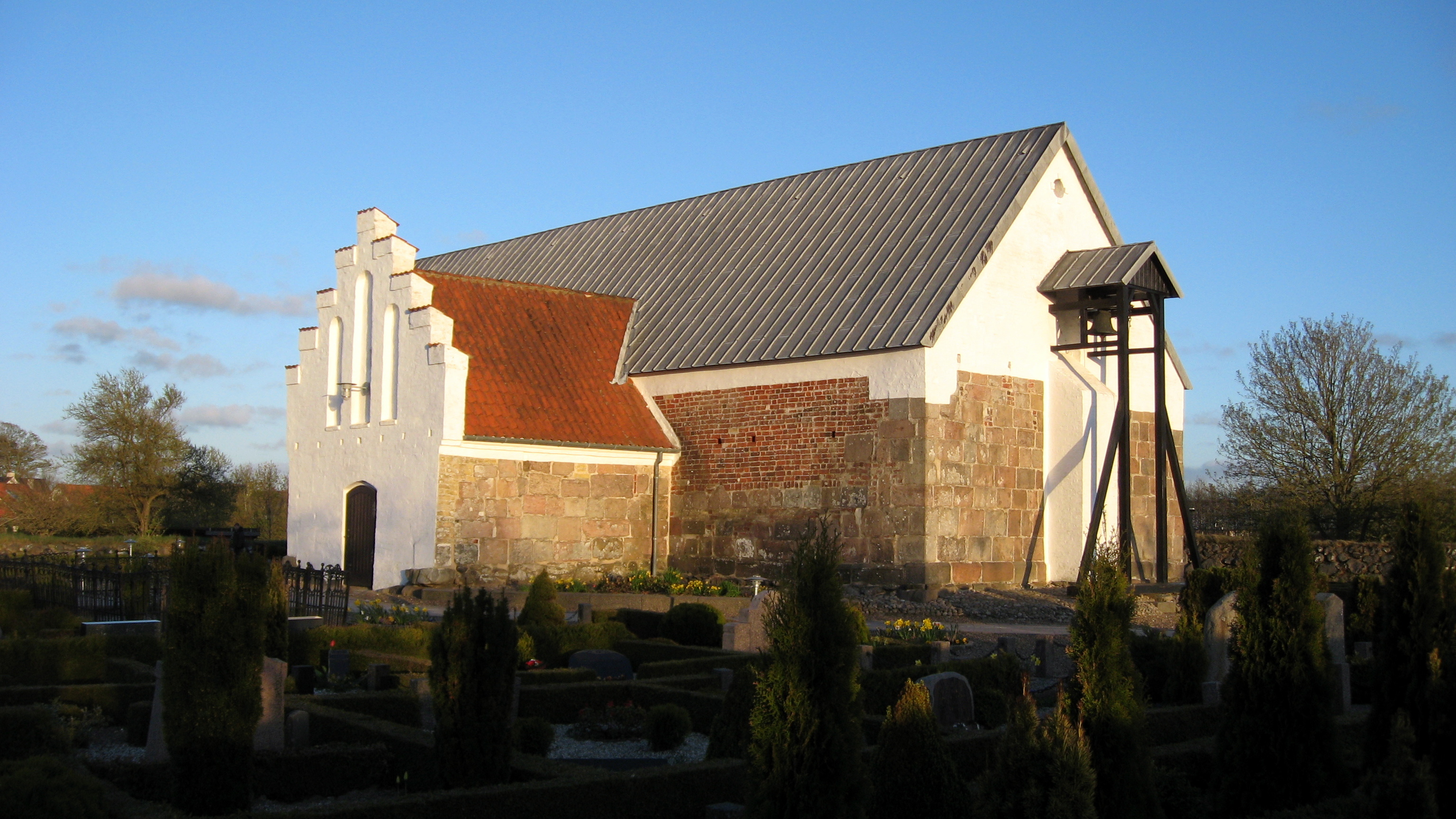 Stenum Kirke, Brønderslev Kommune